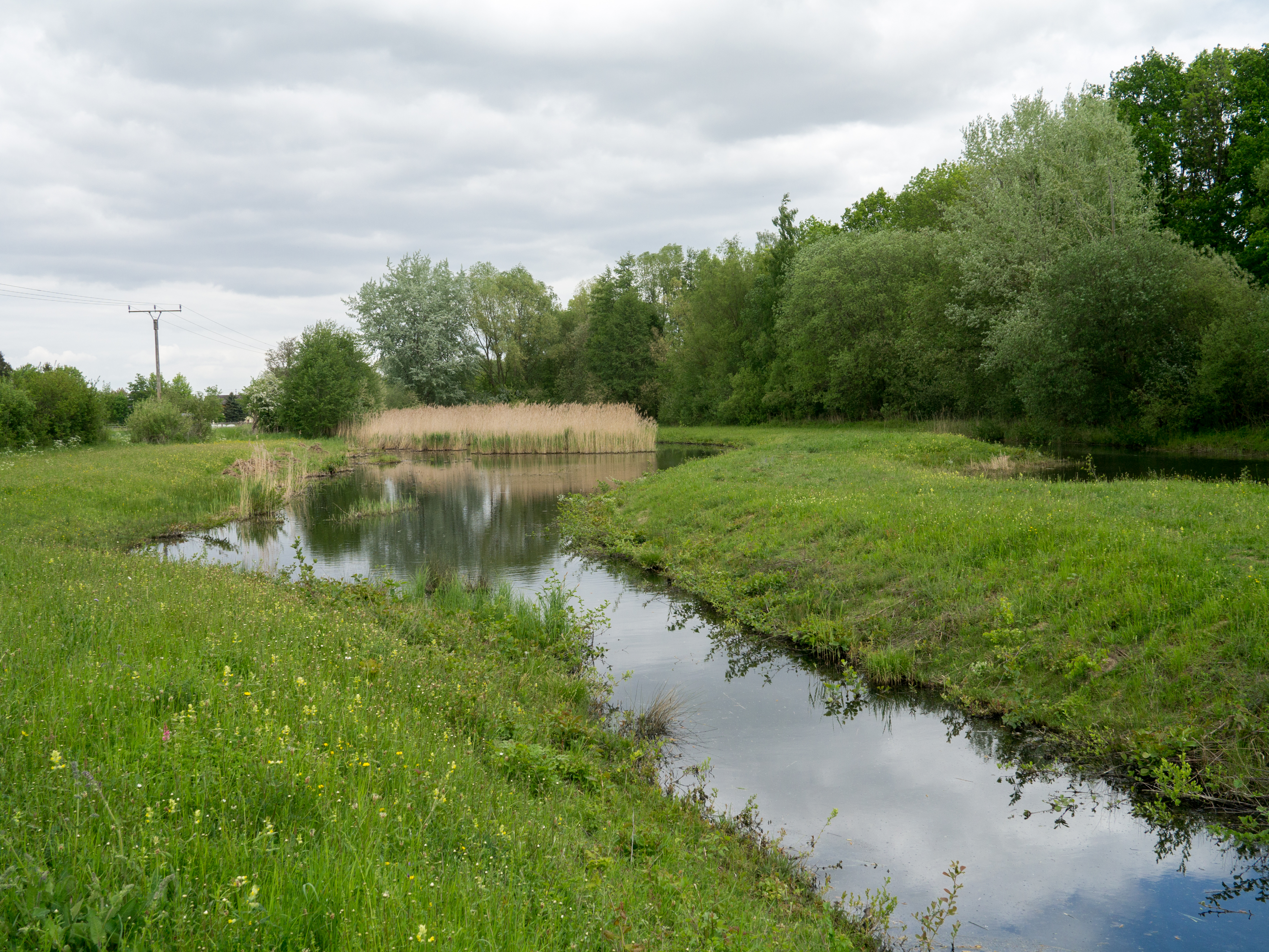 Weiher bei Juntersdorf (schutzwürdiges Biotop BK 5305-908) im Naturschutzgebiet „Neffelbachaue“ (NSG EU-023) in Zülpich